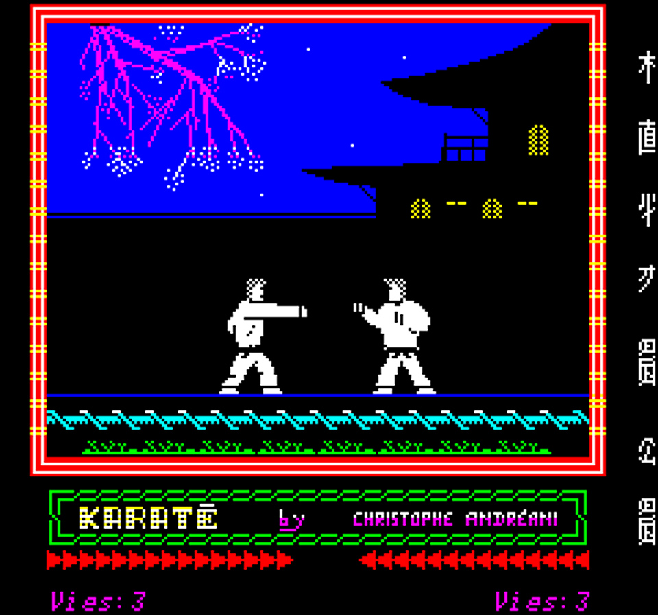 Image du jeu video Karate sur Oric. Image du combat en cours.